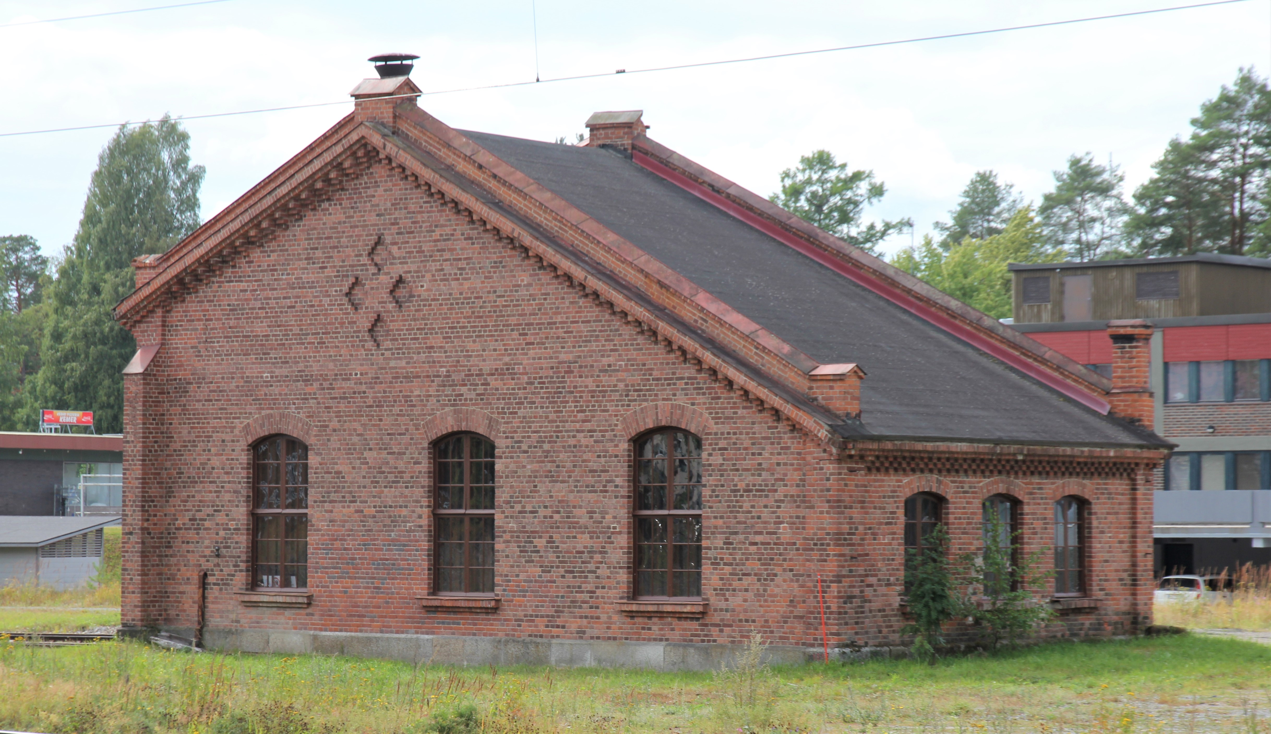 Suonenjoen aseman veturitalli.